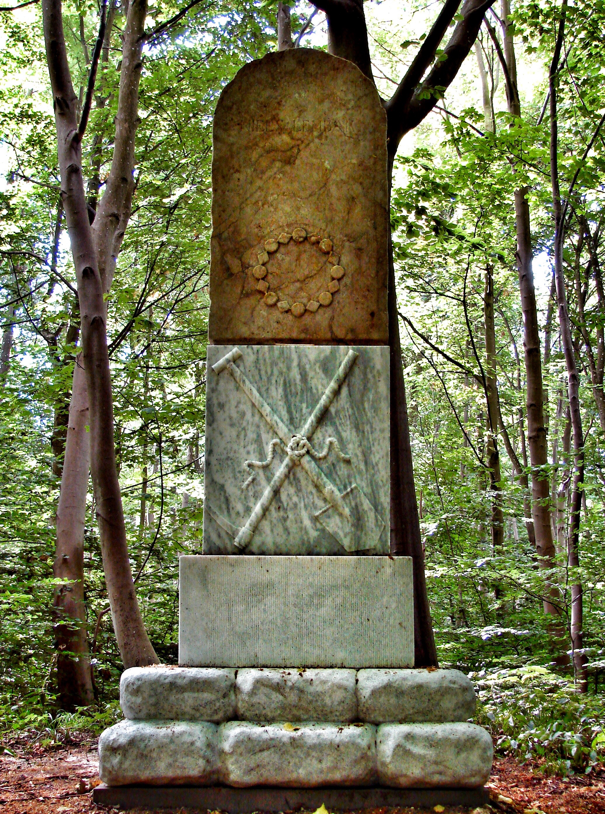 Niels Lembach (1693-1750), mindestatue af Wiedewelt, Mindelunden, Jægerspris Slot, Hornsherred, Sjælland